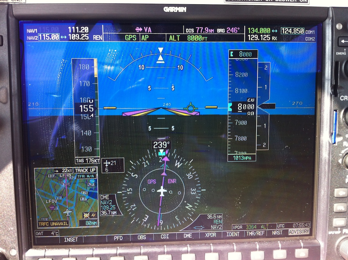 Vue d'un G1000 depuis un Mooney M20R en vol